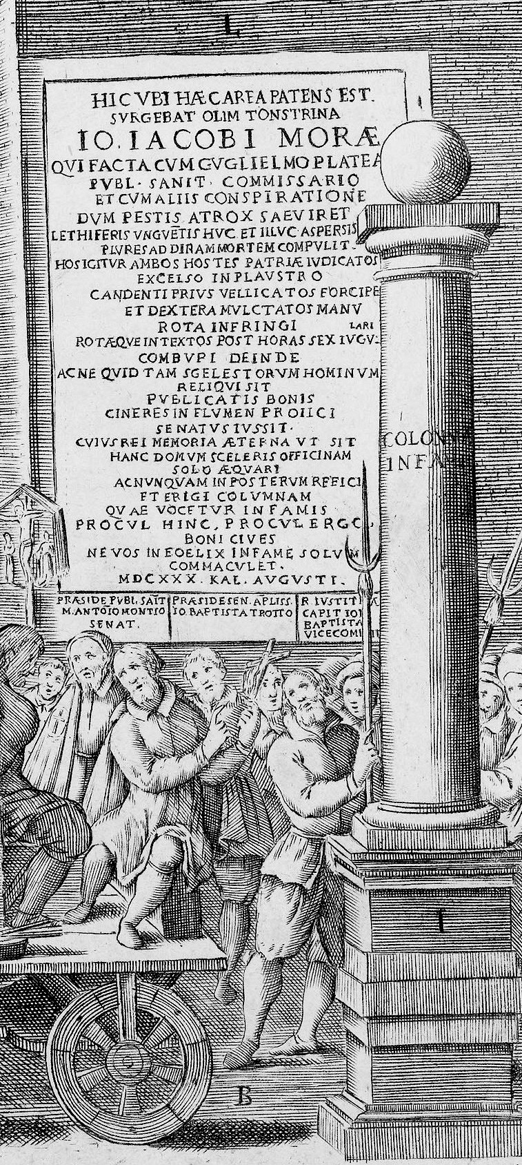 Particolare dalla descrizione del supplizio di Guglielmo Piazza e Gian Giacomo Mora nel 1630 con la colonna infame